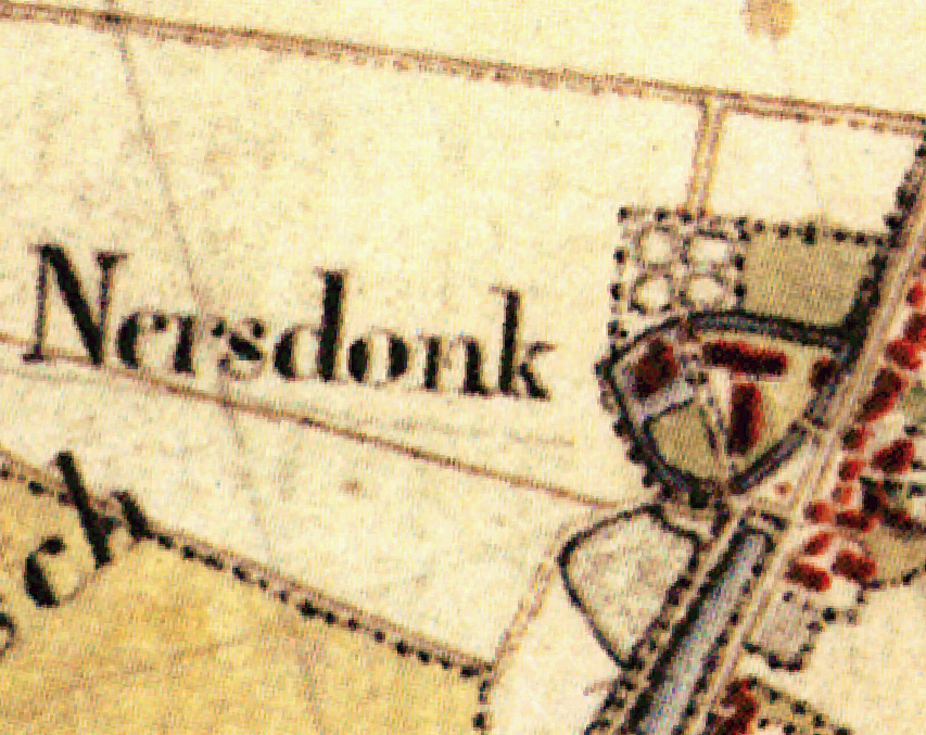 Abbildung des Hauses Neersdonk auf der Tranchot-Karte